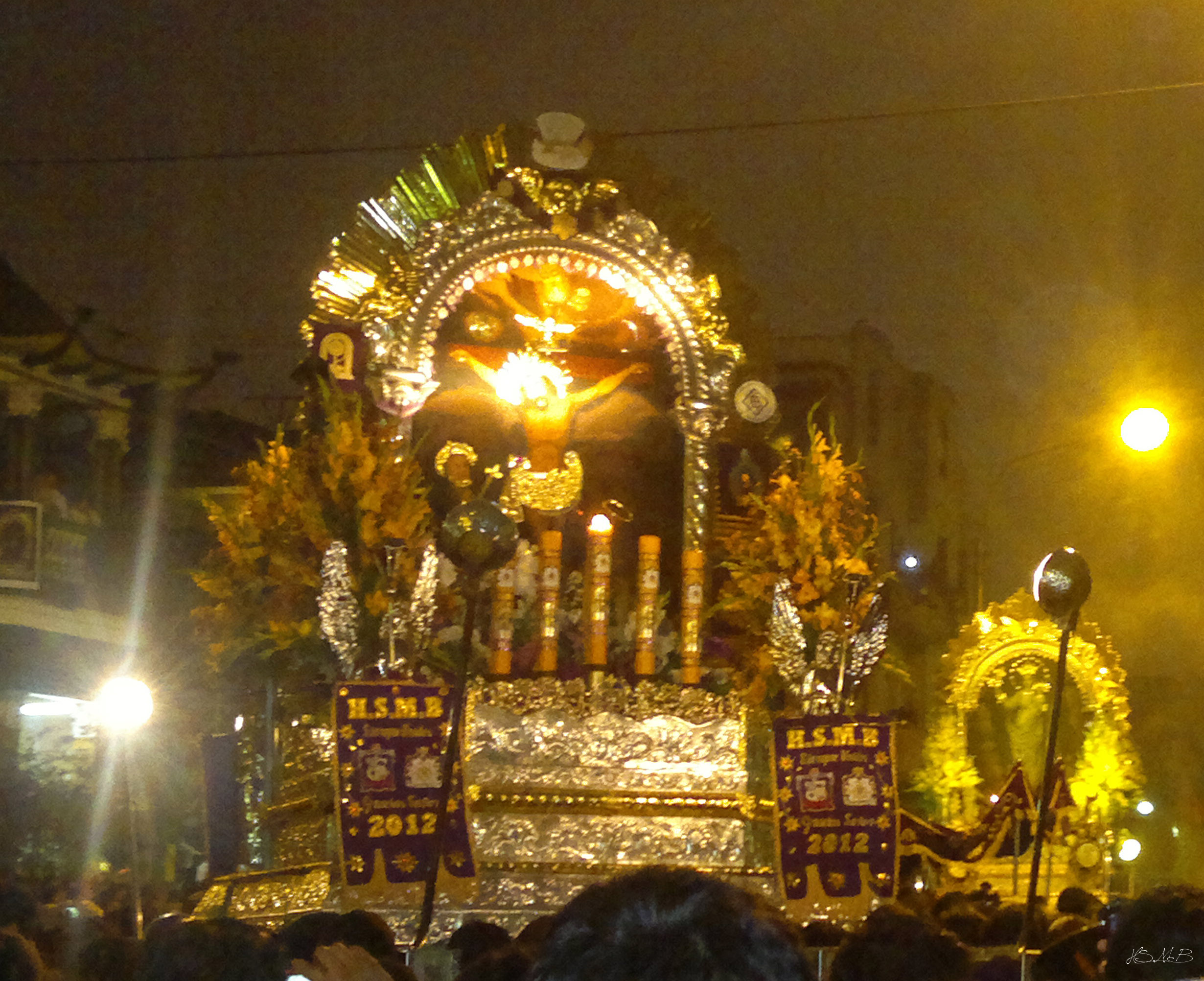 Señor de los Milagros de Breña